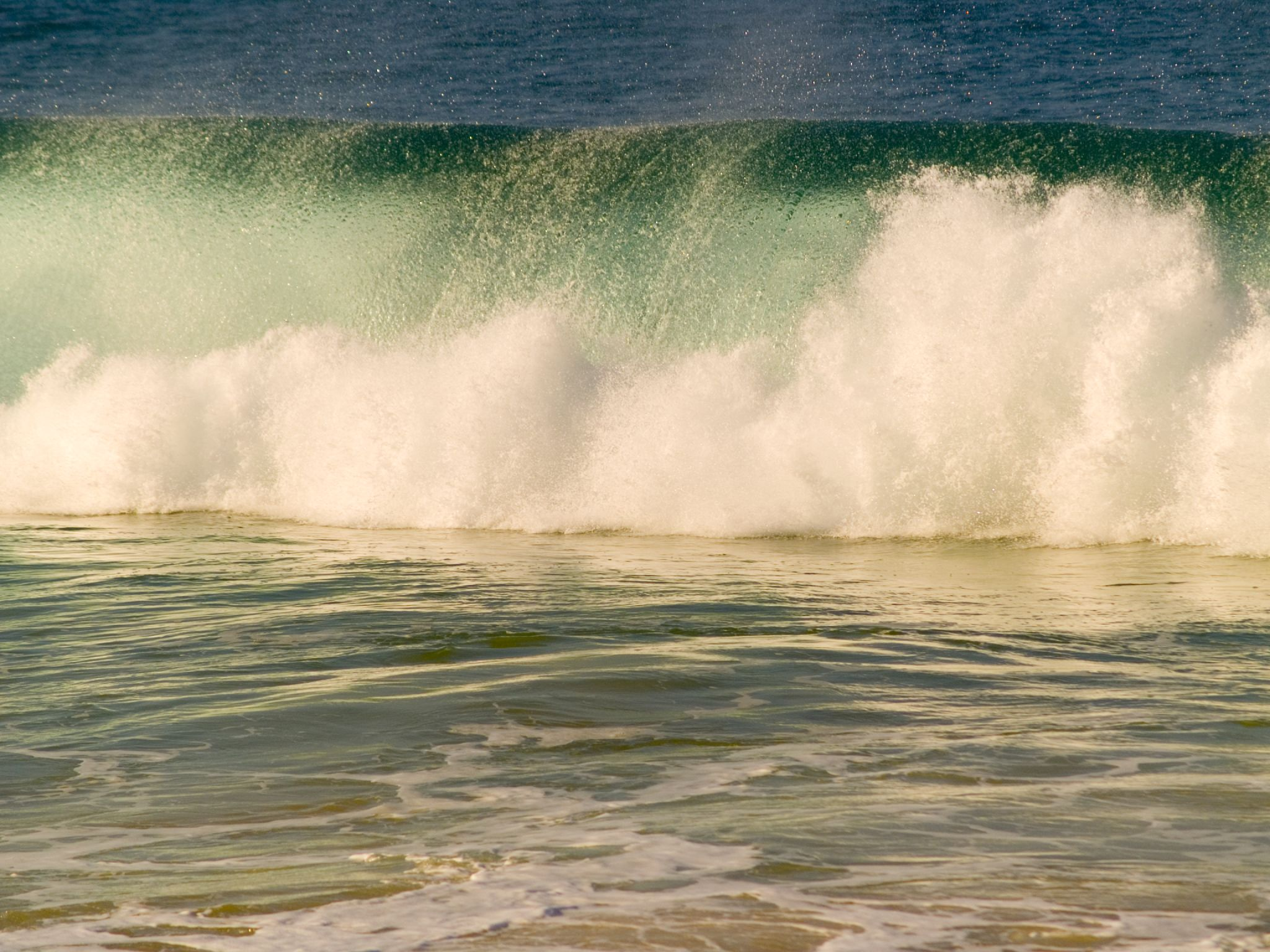 MECO